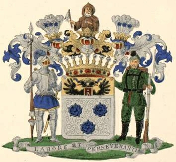 Kotzebue suguvõsa krahvivapp